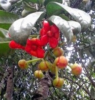 Bunga asam gelugur jantan